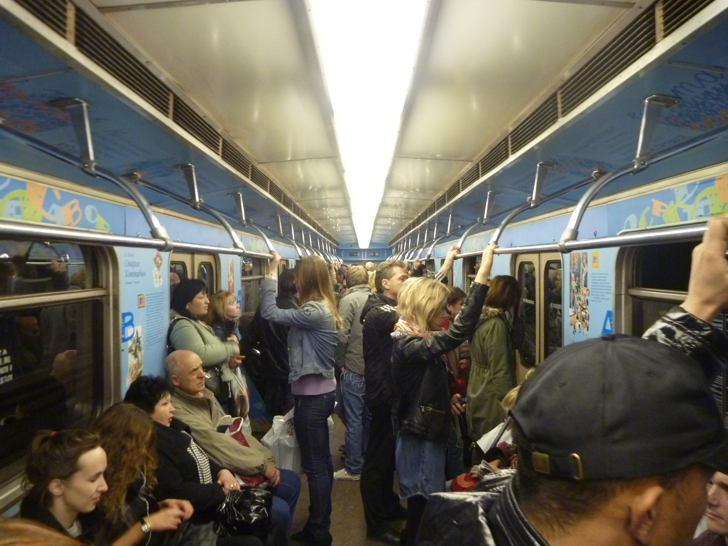 Chitayashaya Moskva (Reading Moscow) train (Метропоезд Читающая Москва)